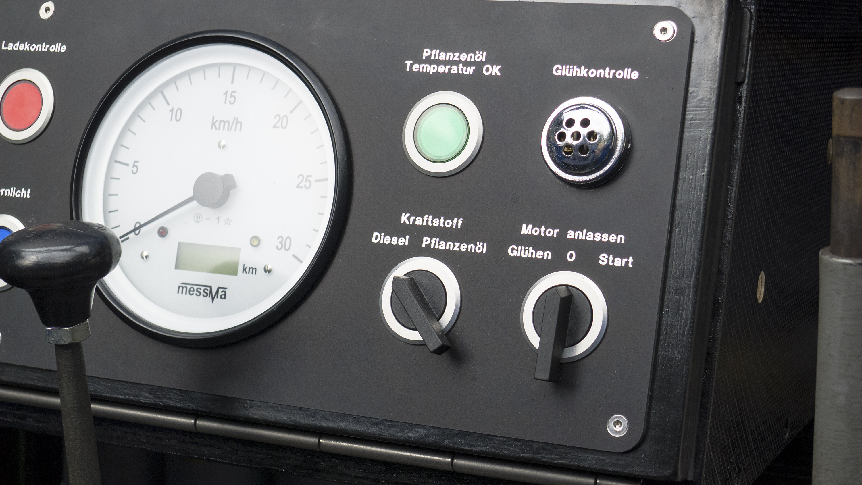 Liliputbahn im Wiener Prater in Wien 2, Diesellok D1, Kraftstoff-Umschalter